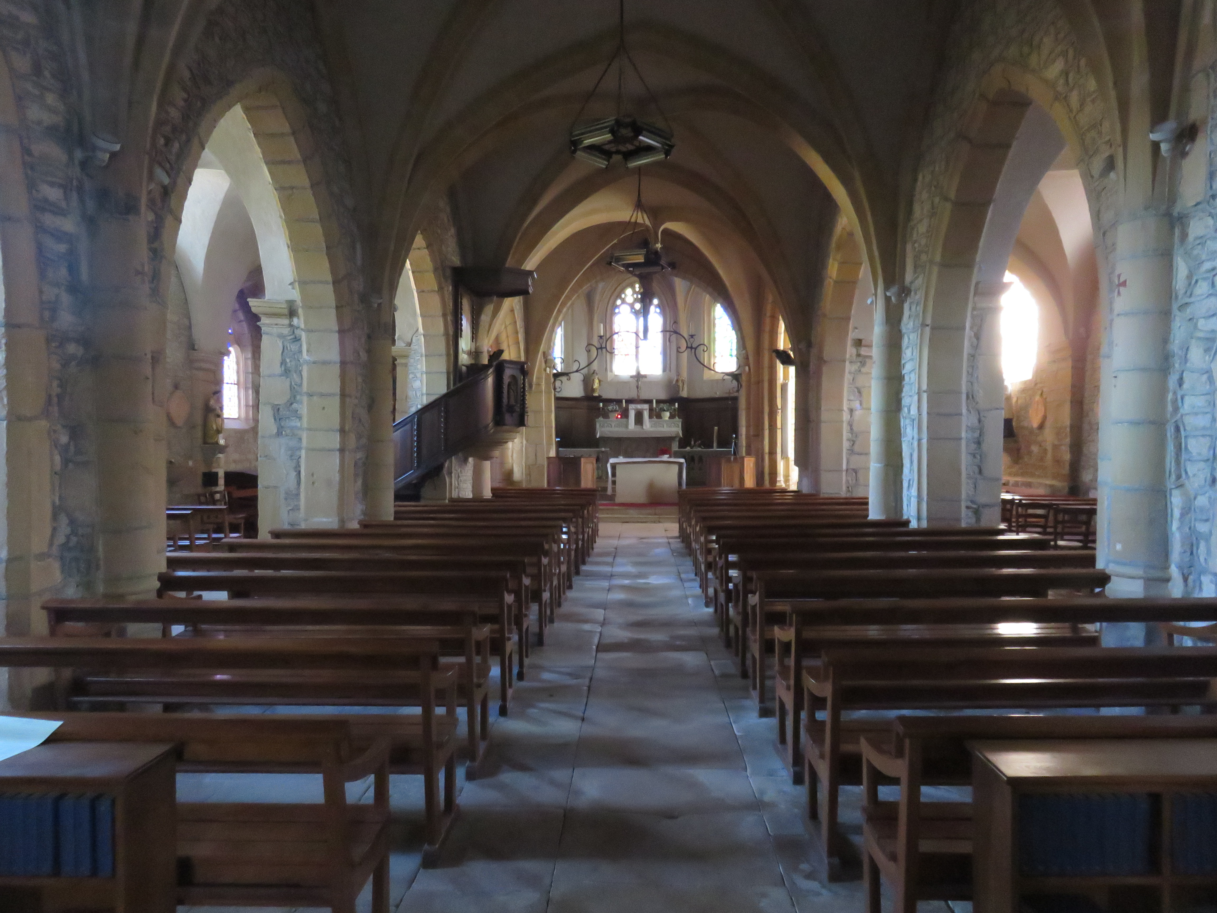 Nef de l'église Saint-Martin de Ville-sur-Jarnioux (Rhône, France).